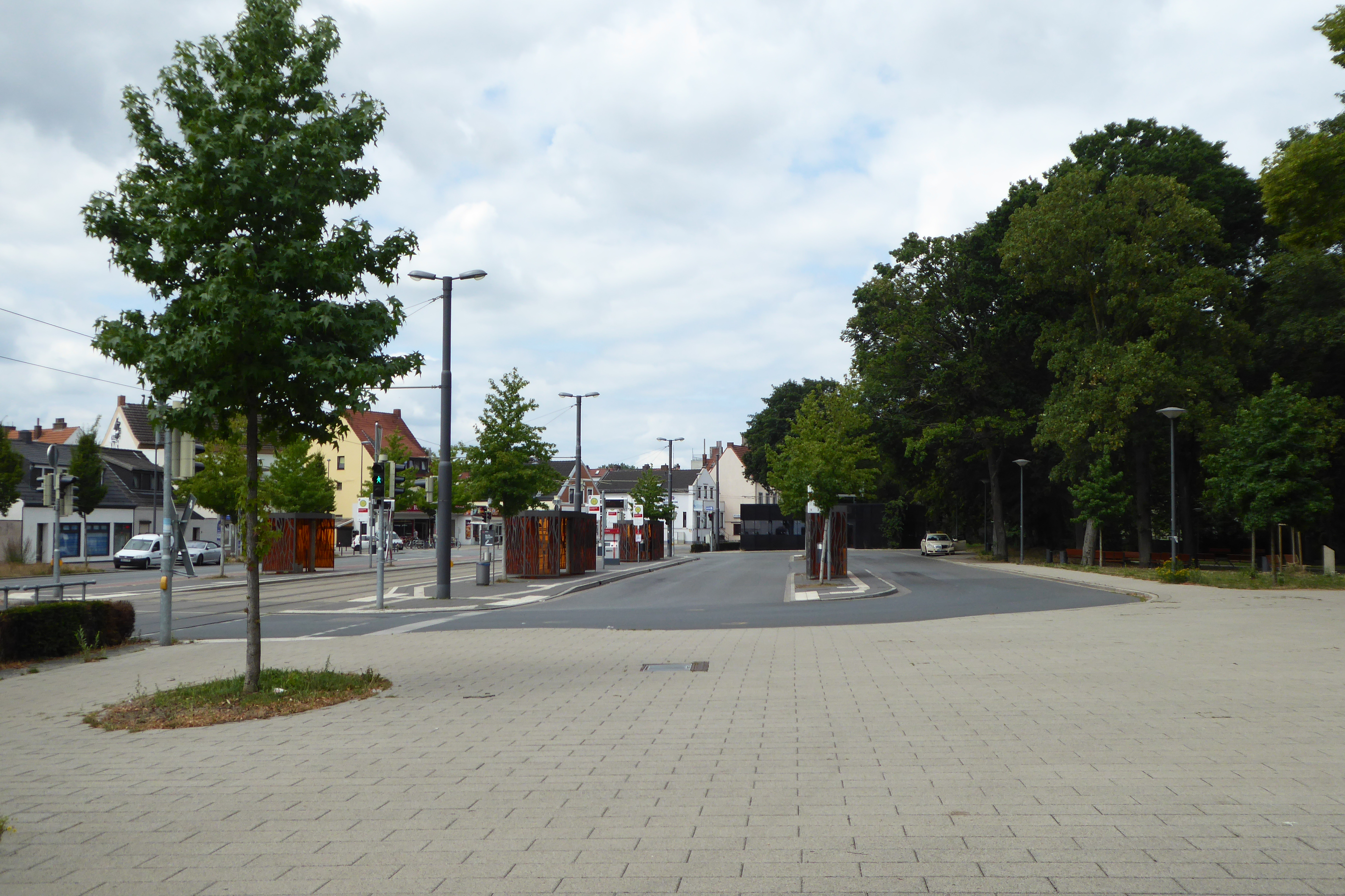 Bremen-Neustadt: Busbahnhof Huckelriede. Am rechten Bildrand ist der Gedenkstein des Bremer Senats für die drei Todesopfer der Geiselnahme von Gladbeck zu erkennen.